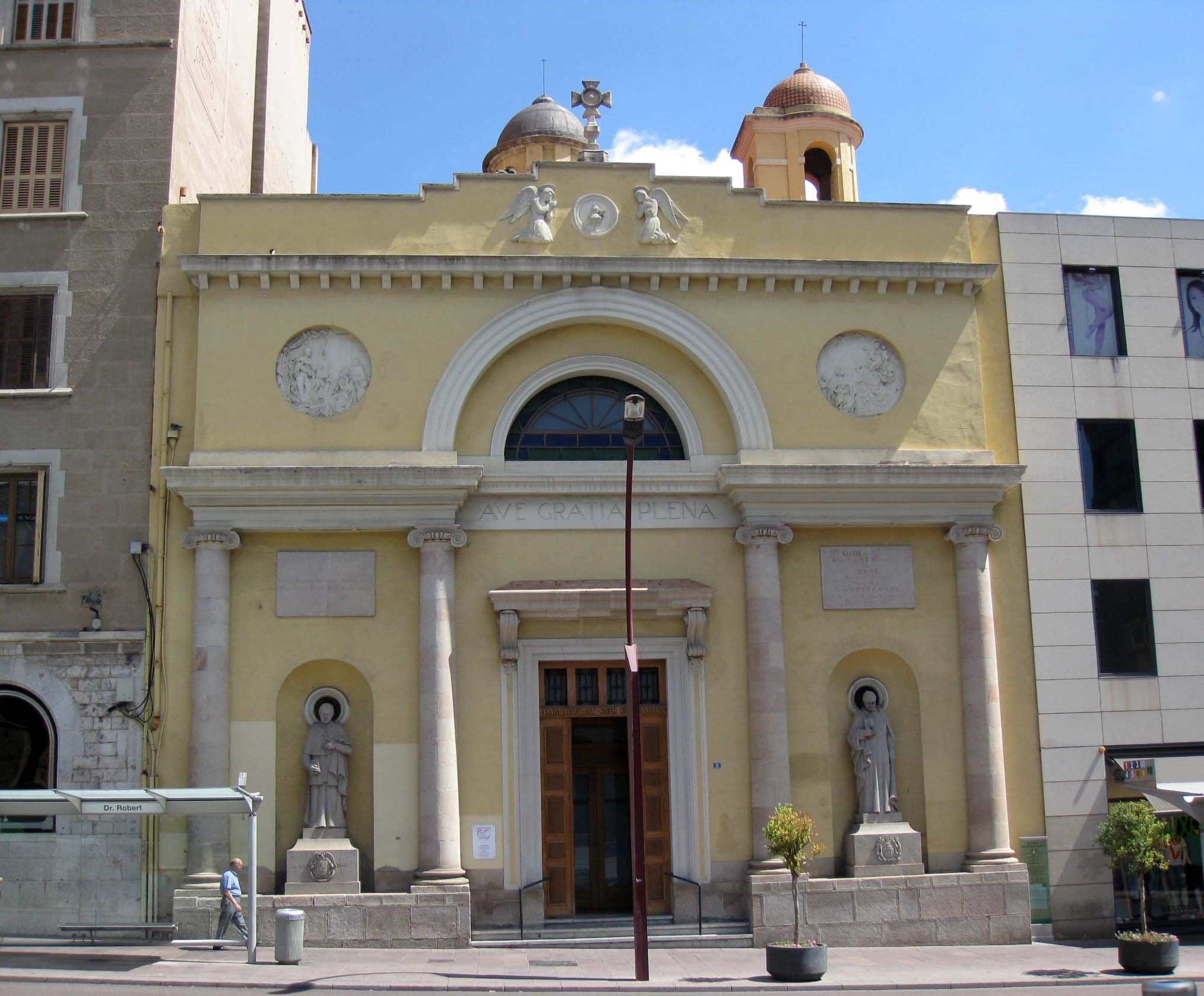 Església dels Pares Claretians (Sabadell)